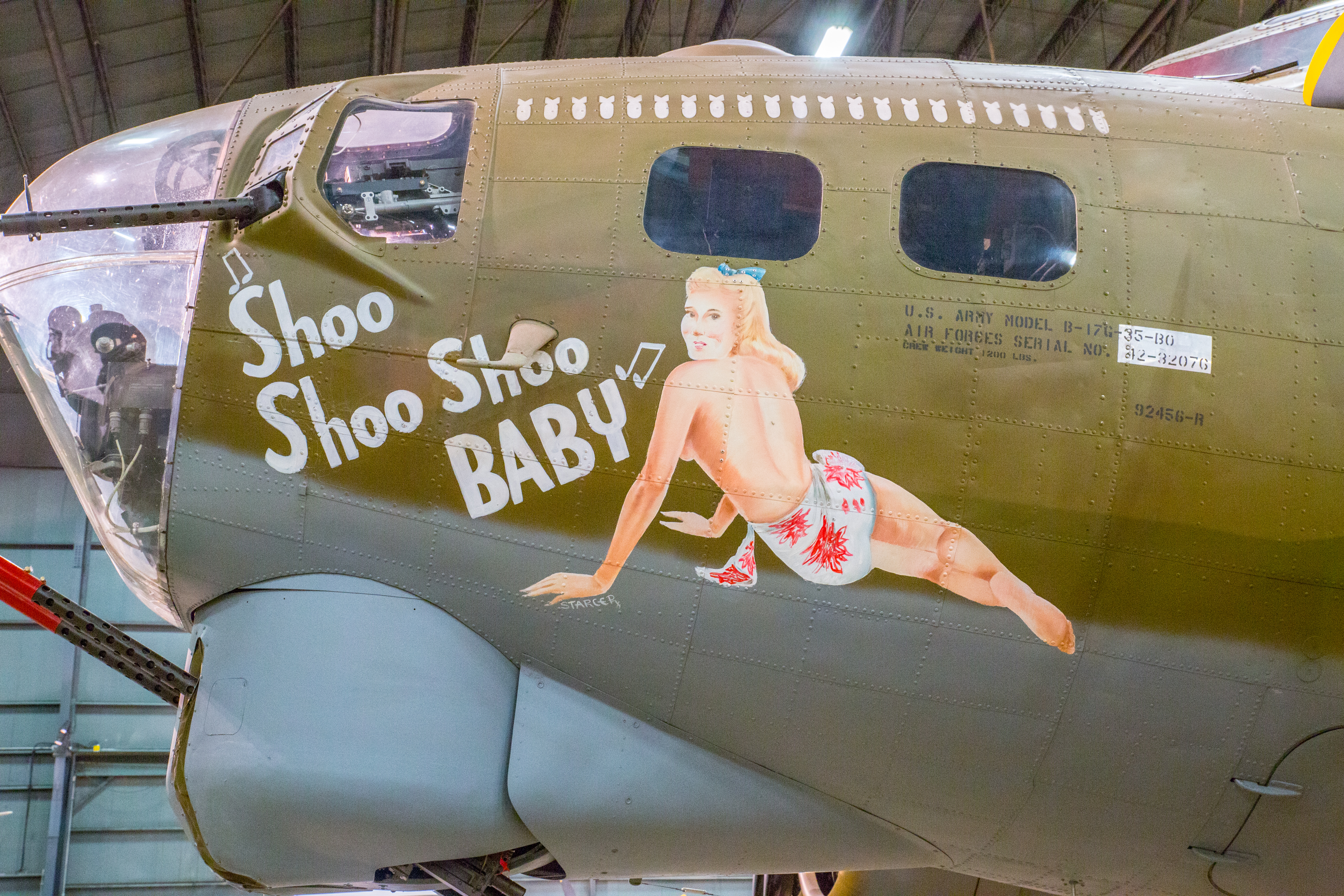 Boeing B-17